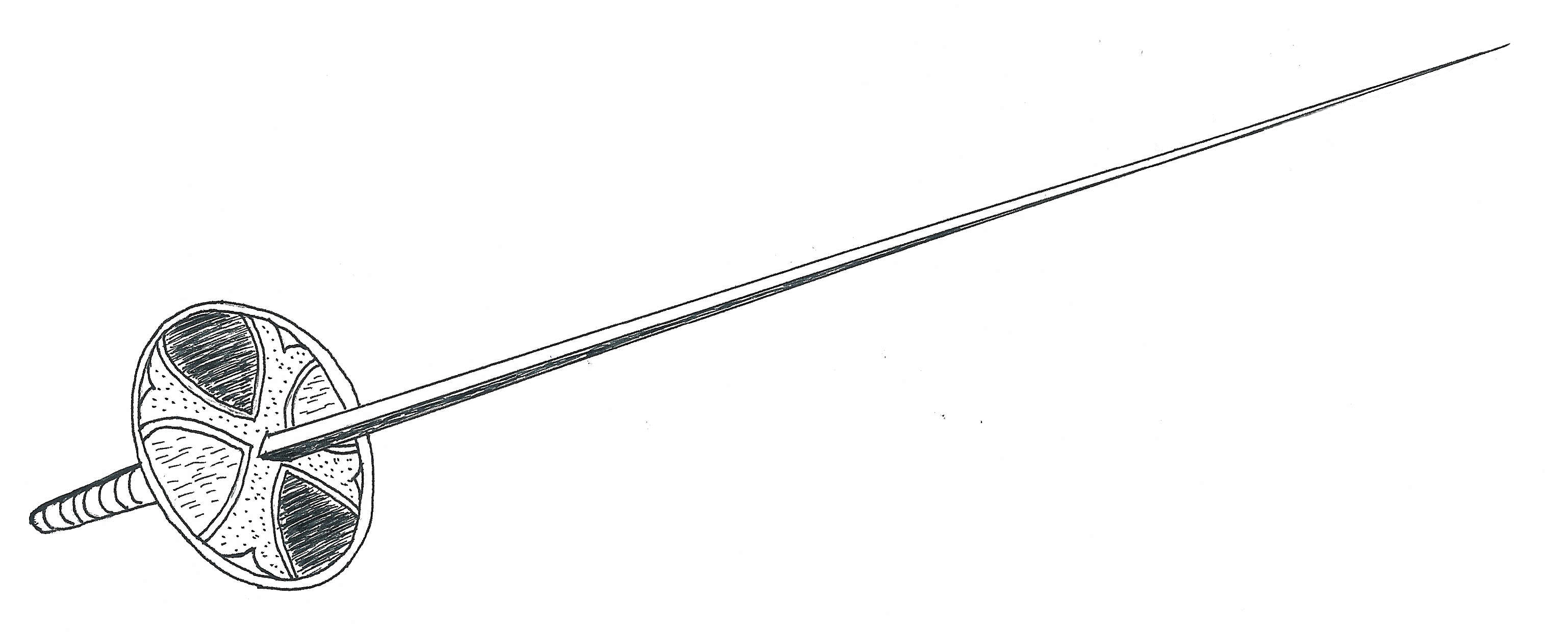 Pariser Stoßdegen, entstanden um 1750 in Frankreich, Grafik selbst erstellt "Pariser" thrusting small sword, derived from the French foil in about 1750, graphics done by myself